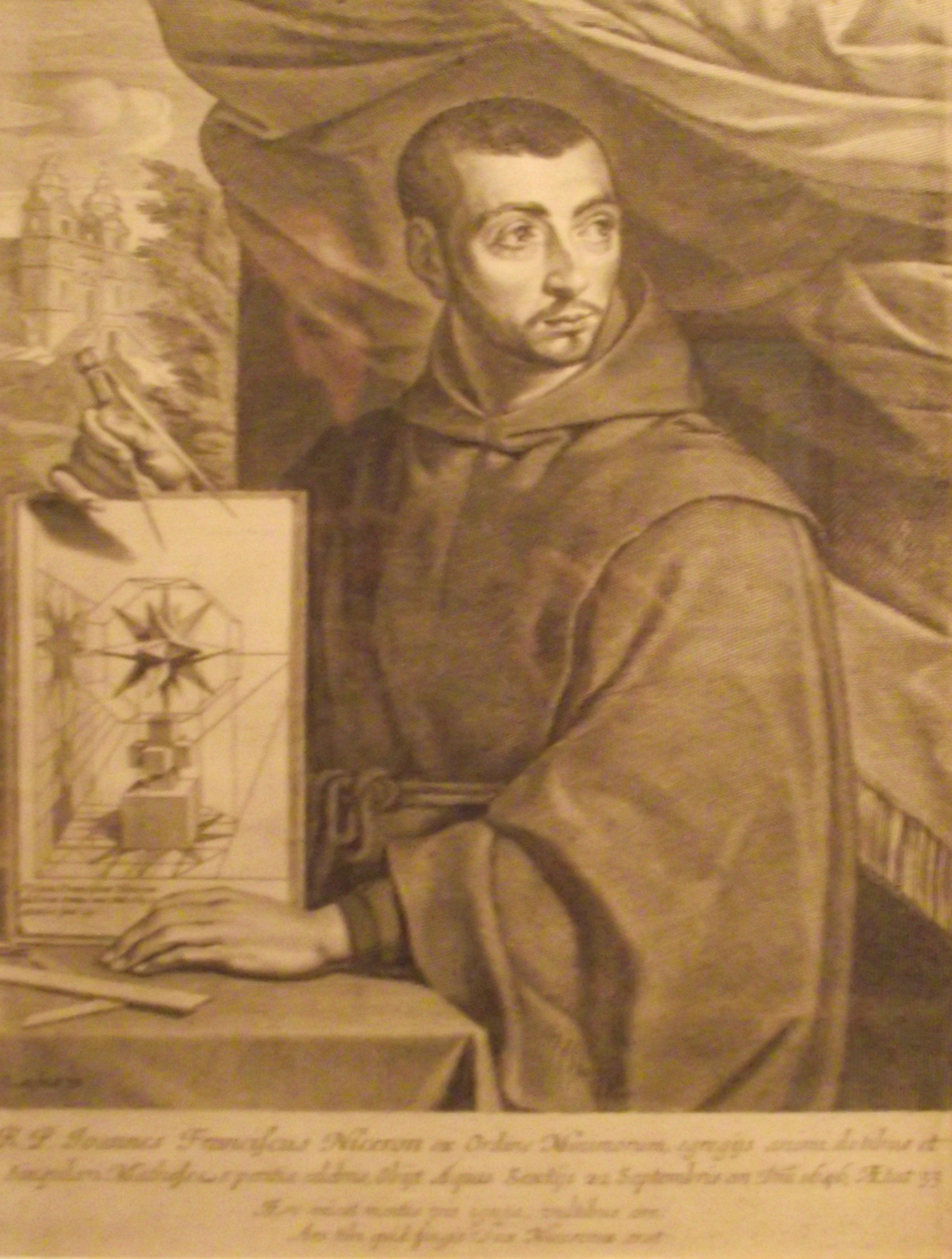 Gravure du mathématicien Jean François Nicéron.